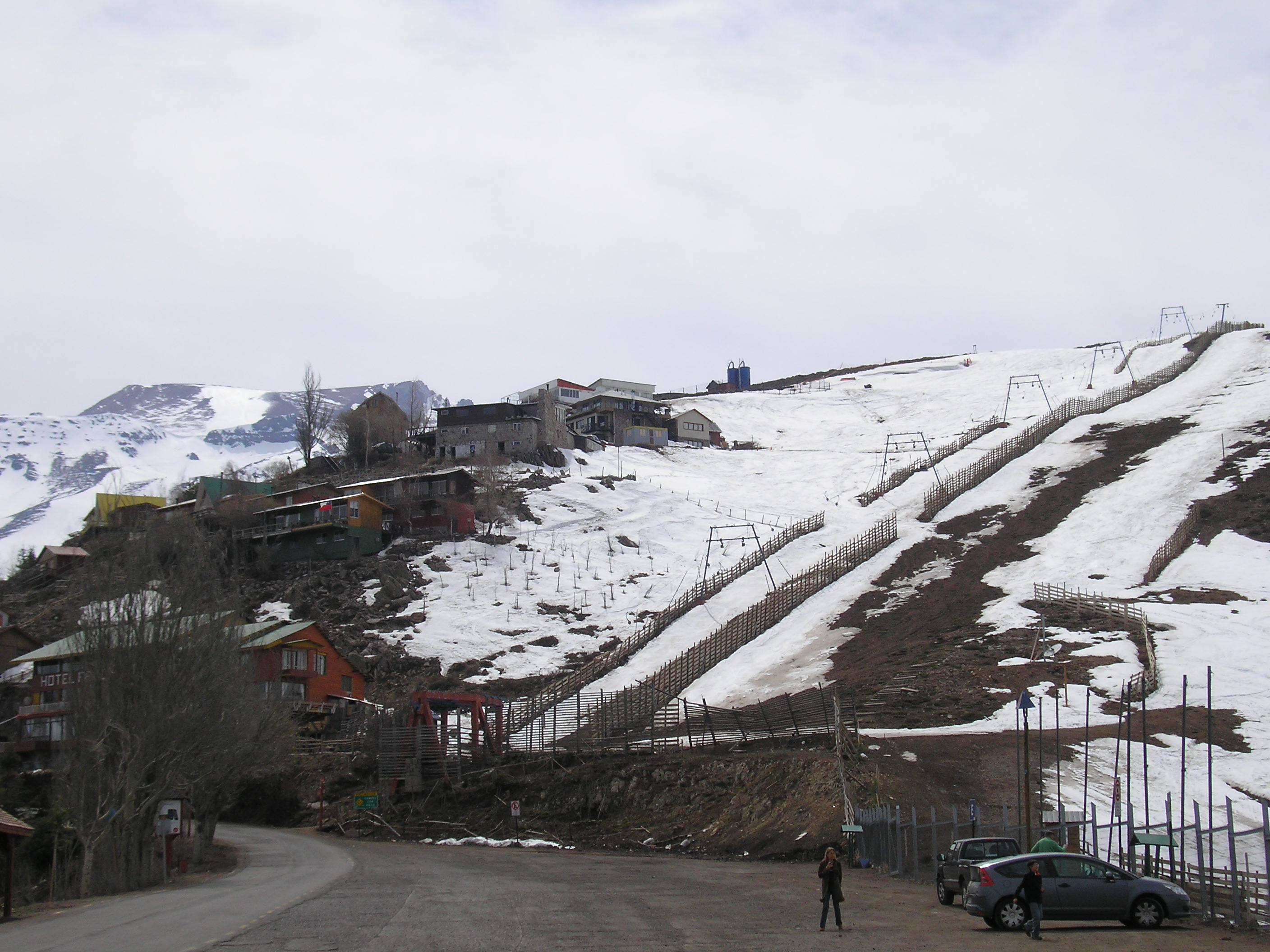 El día de cierre de temporada en el colorado